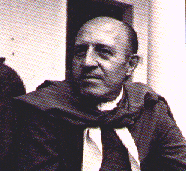 Foto de Adolfo Ábalos, pianista folclórico argentino